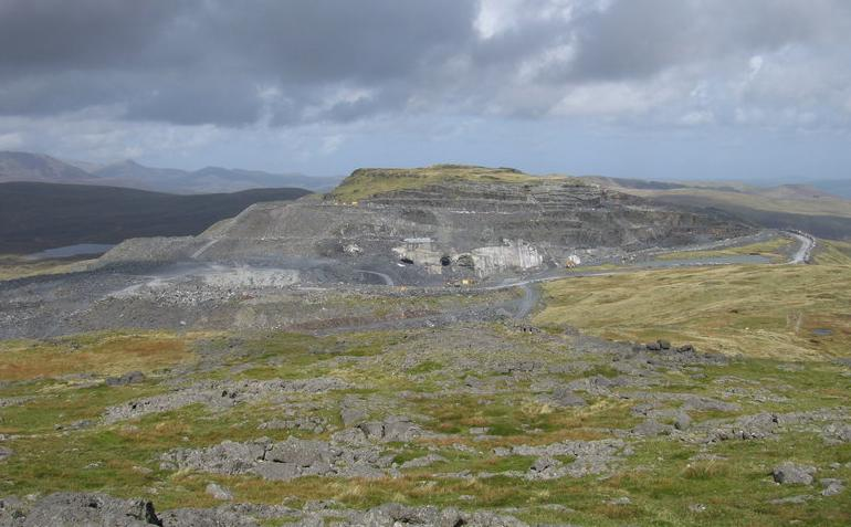 Manod Mawr North Top from Manod Mawr